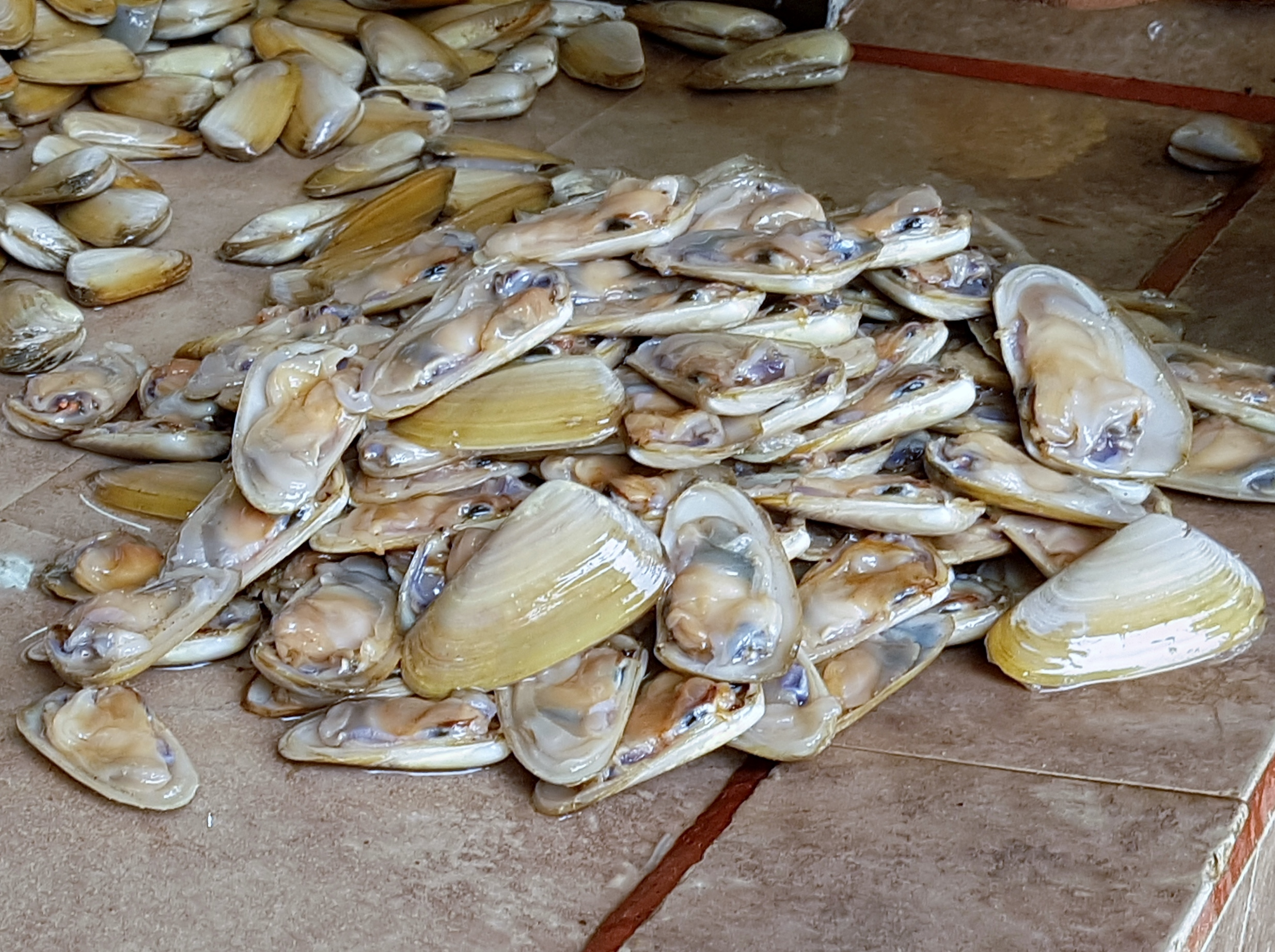 Abriendo machas en el Chiringuito de Zapallar, Chile.